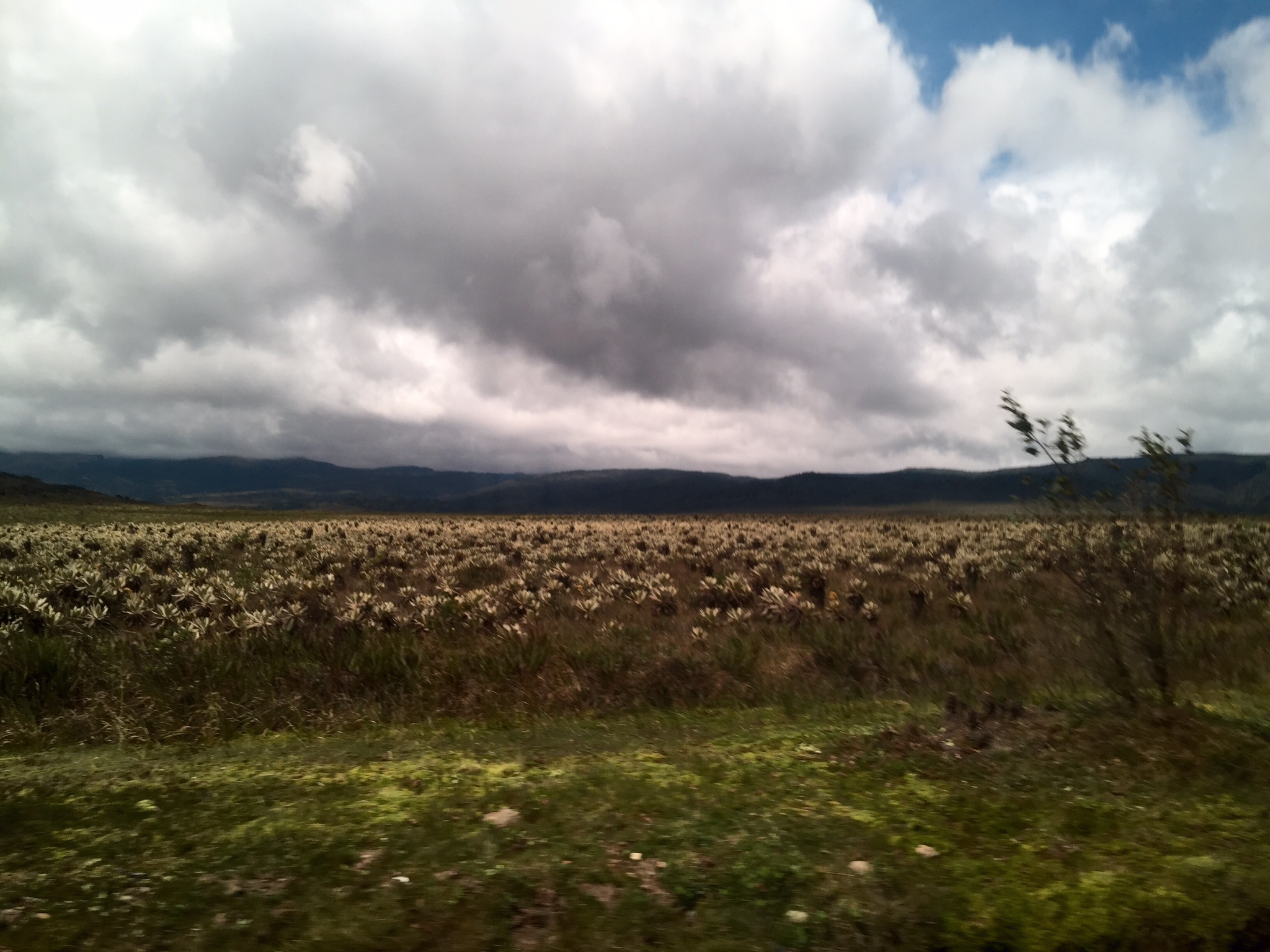 Esta zona de páramo se encuentra en el departamento del Cauca en Colombia. Está comprendida en el complejo natural de la biosfera del cinturón andino, región del macizo colombiano perteneciente a la Cordillera Central de los Andes en Colombia.